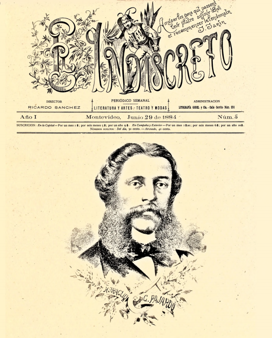 Portada de El Indiscreto. Nº 5 de 1884